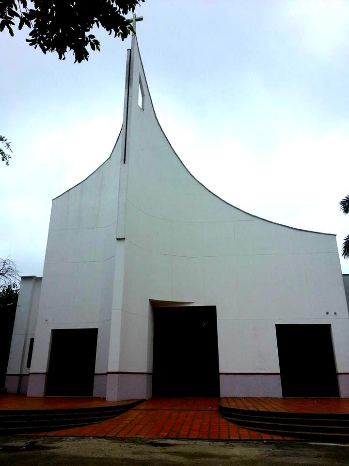 Esta fotografía fue tomada en el municipio colombiano con código 05154.